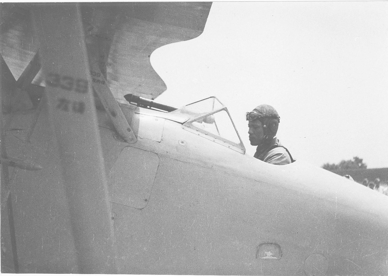 95式戦闘機上の加藤大尉。昭和13年(1938)5月25日、彰徳にて。